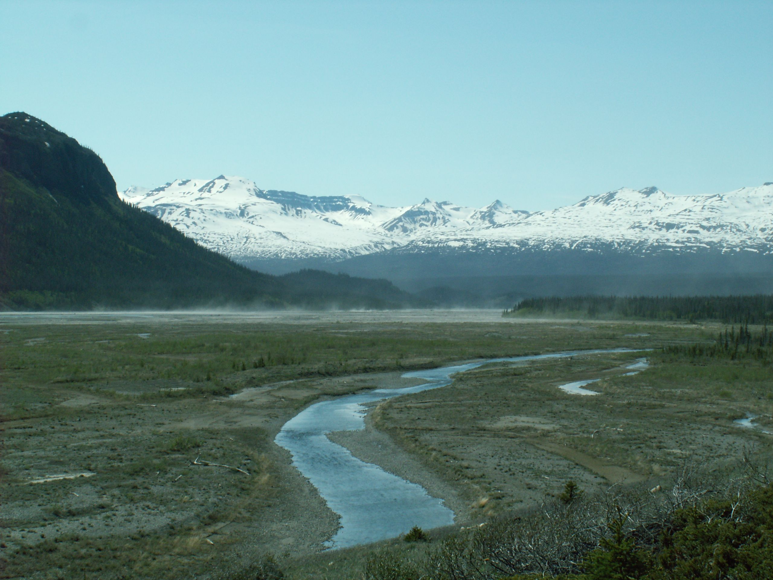 Alsek River Yukon near Sugden Creek